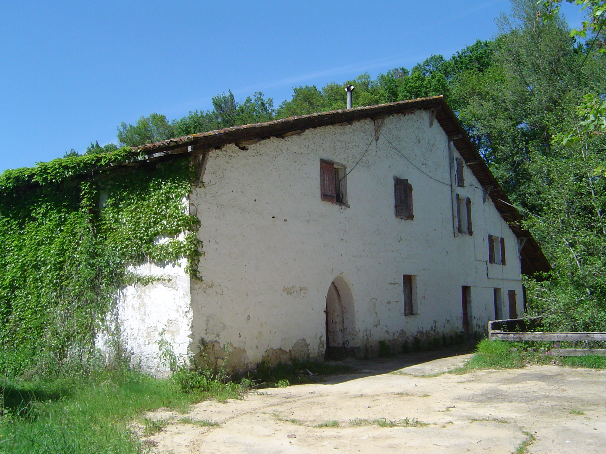 Moulin fortificat de la Guauga ; Larbei ; Gasconha